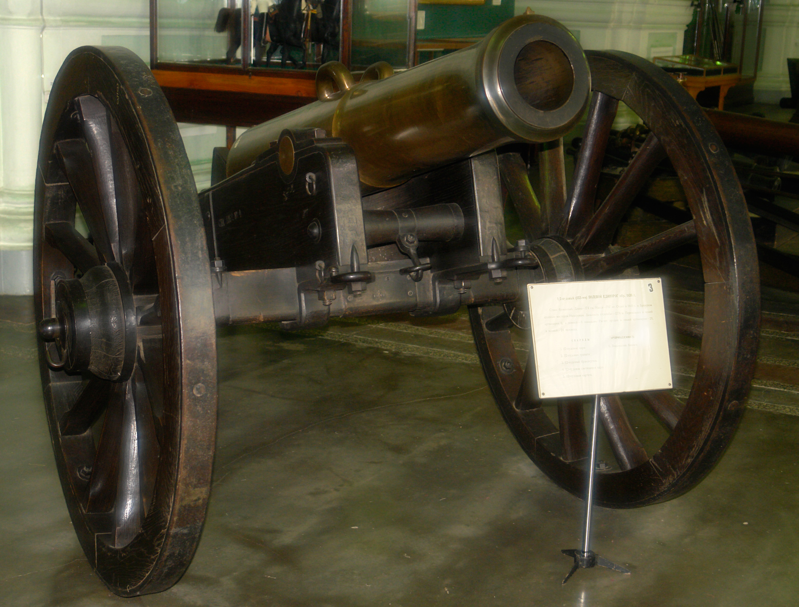 1/2 пудовый (152-мм) полевой единорог образца 1838 года. Фрагмент. Бронза, длина 174 см. Масса 707 кг, отлит в 1849 в Брянском арсенале мастером Назаровым. Дальность 1278 м. Военно-исторический музей артиллерии, инженерных войск и войск связи, Санкт-Петербург.